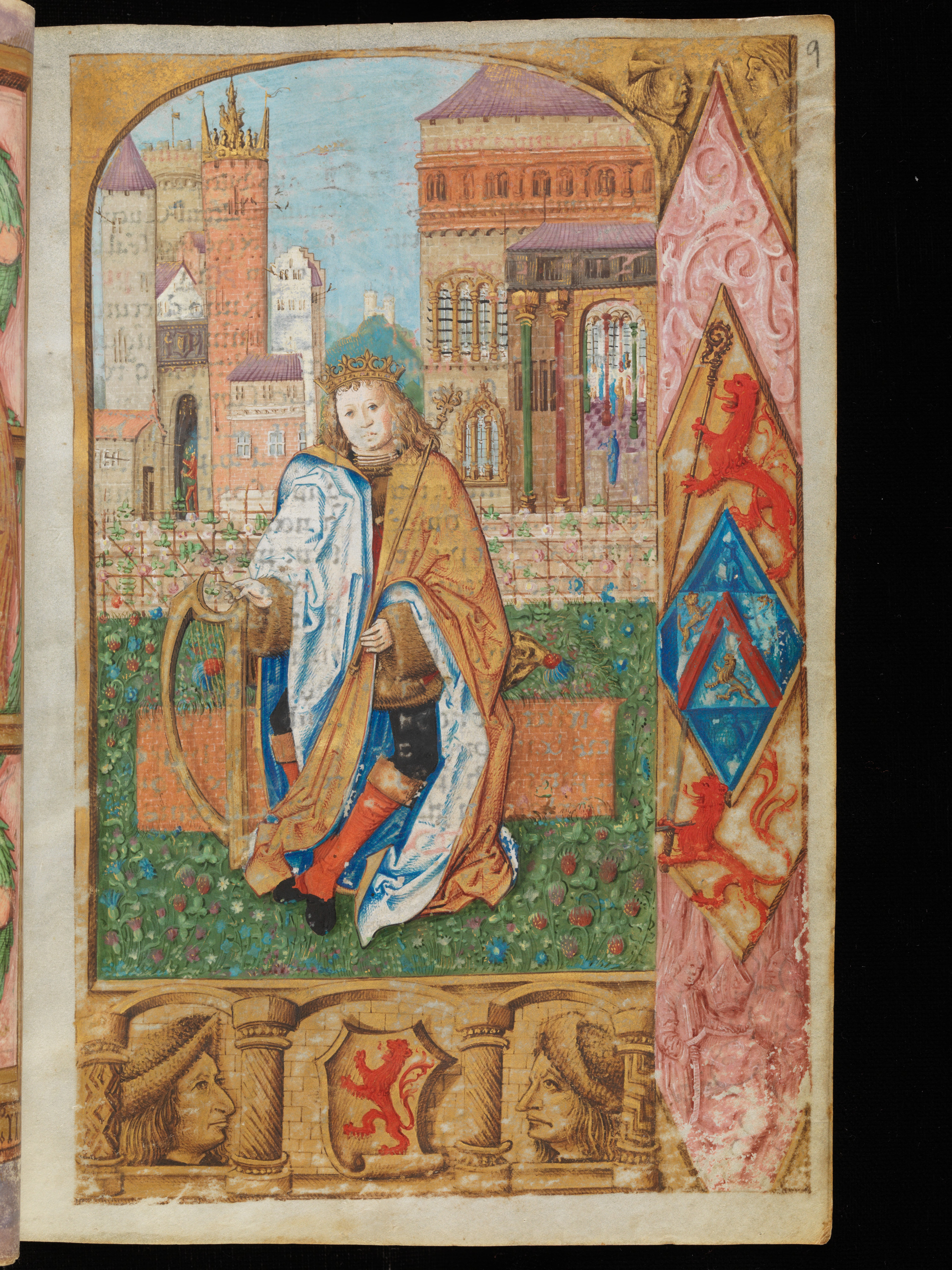 Brevier des Jost von Silenen, pars aestivalis. Zürich, Schweizerisches Nationalmuseum, LM 4624.2, f. 9r. 9r: Eingangsseite des Psalteriums: Der thronende David. David mit Königskrone, im Garten seines Palastes, hält mit der Rechten die auf dem Boden abgestellte Harfe mit goldenen Saiten und in der linken den goldenen Herrscherstab mit Lilienspitze. Am rechten Rand heraldische Darstellung: ein steigender roter Löwe mit goldenem Pedum, die Wappen der Isabella von Chevron und ein steigender roter Löwe mit dem Schwert; ganz unten zwei Engel mit dem Silenen-Wappen mit Mitra. Am unteren Rand das Silenen-Wappen und zwei männliche Profilköpfe. Quelle der Beschreibung